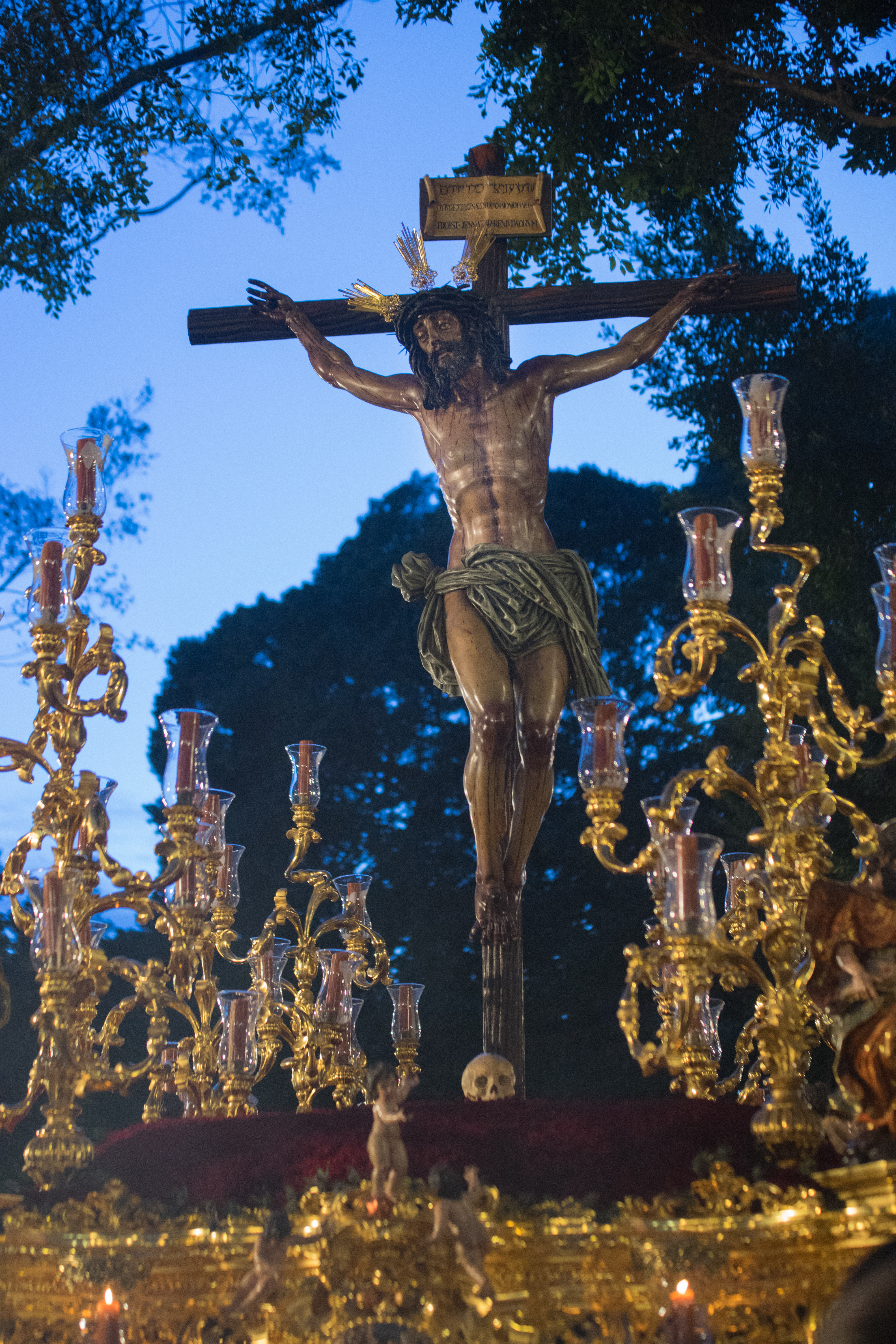 Trono del Cristo Venerable Hermandad de la Caridad en Cristo Nuestro Señor y Cofradía de Nazarenos del Santísimo Cristo de la Agonía, María Santísima de las Penas, Reina y madre, y Santo Domingo de la Calzada This is a photography of a Folklore festival in Spain (Wikidata id Q9075883).